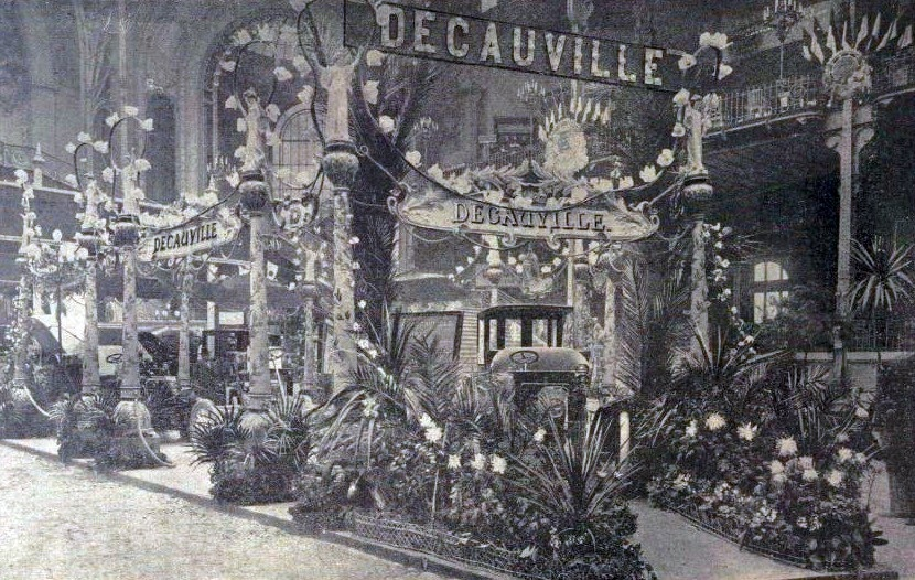 Decauville au Salon de l'Automobile en 1901 (La Vie au Grand Air du 22 décembre 1901)